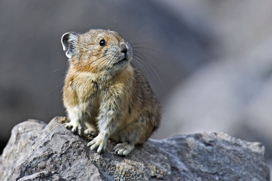 Pika, Medecine Lake, Near Jasper, Alberta